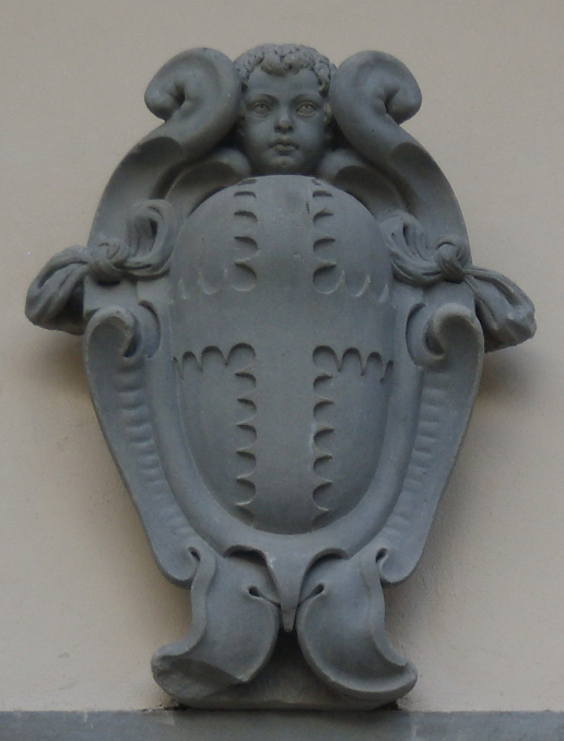 Palazzo sacrati, cortile stemma guadagni